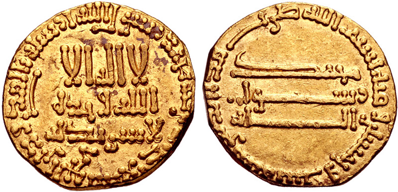 Dinar de ouro de al-Mansur